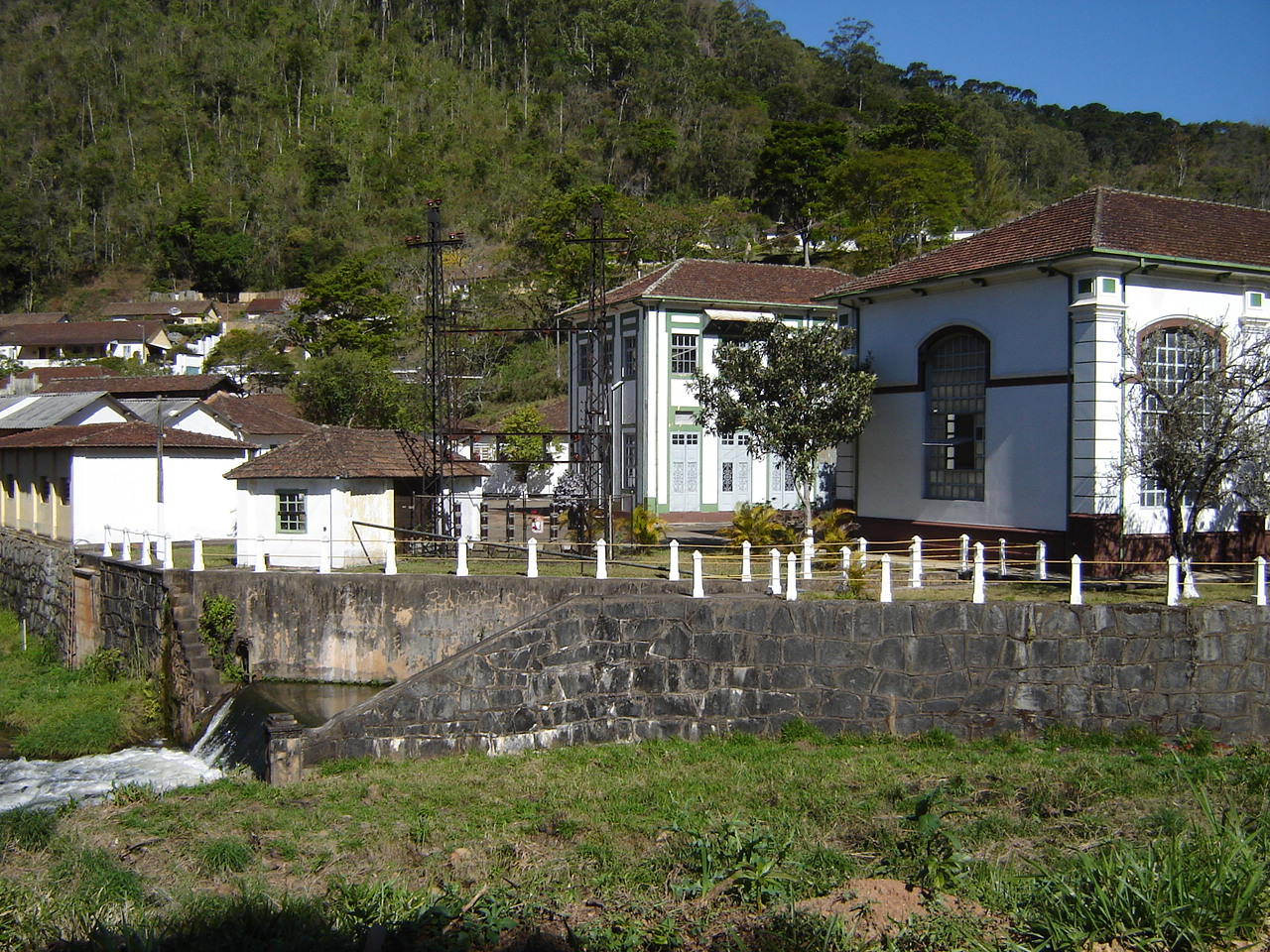 Usina Hidrelétrica no município de Wenceslau Braz, Minas Gerais